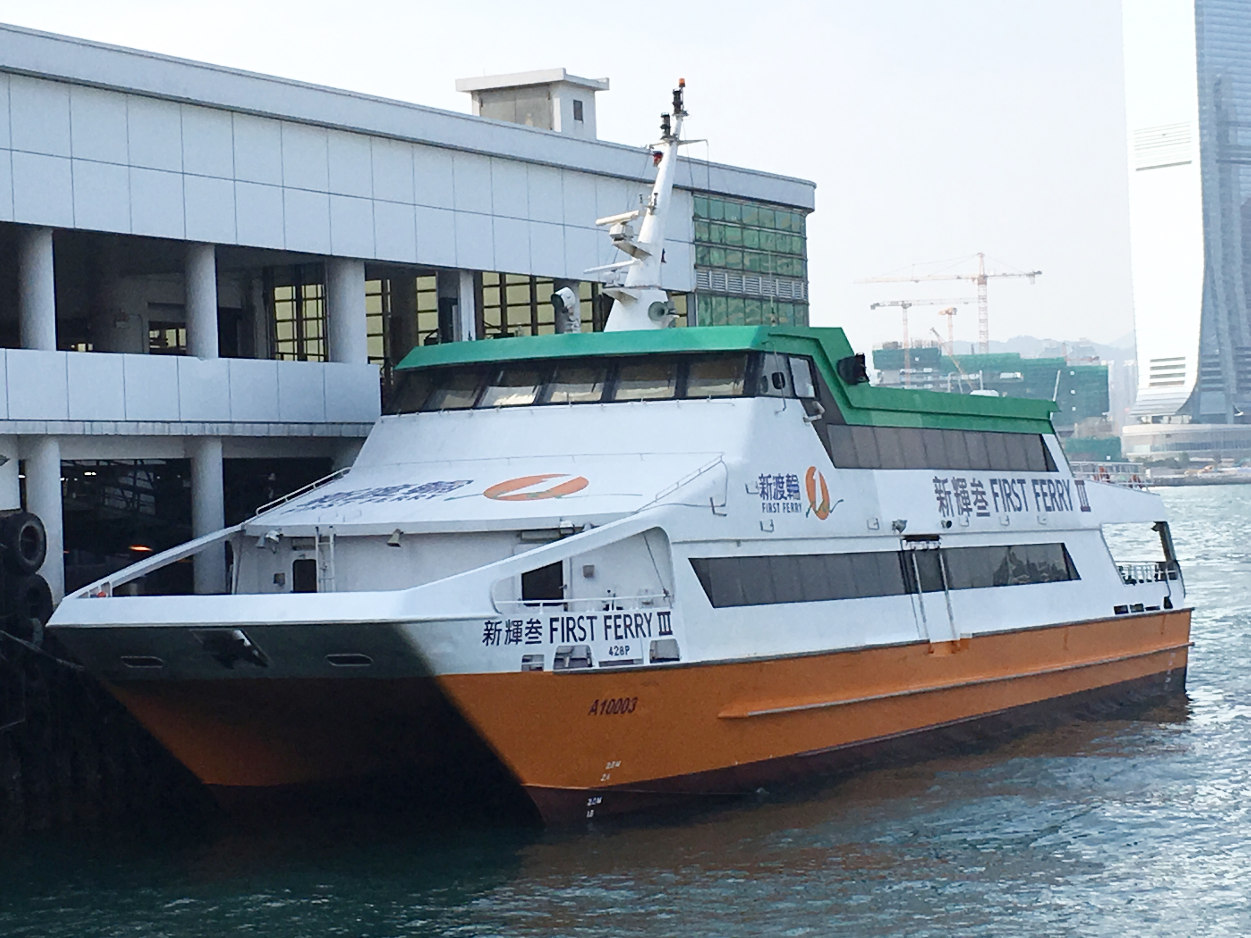 This photo is taken in Central.